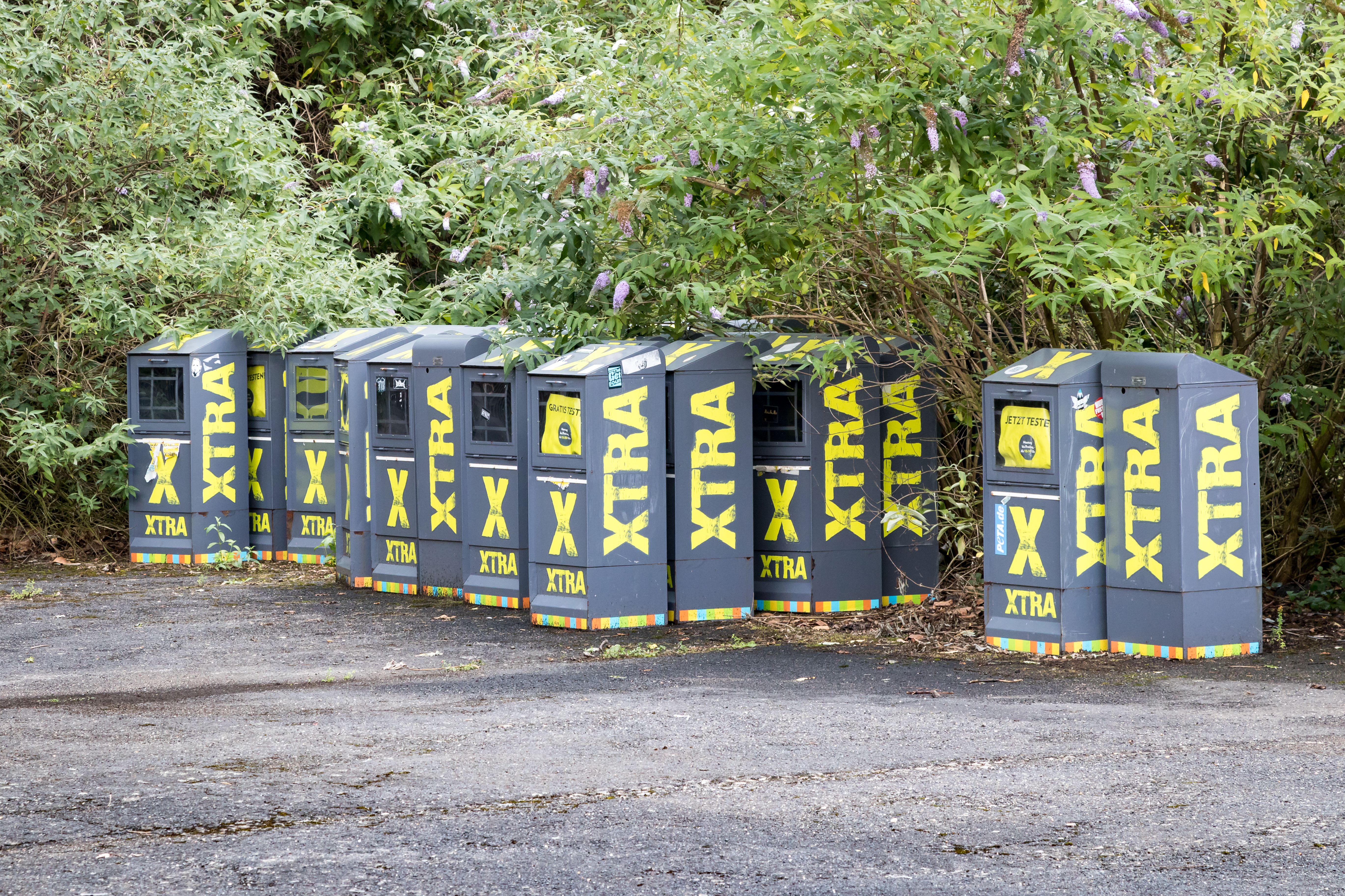 ausrangierte XTRA Verkaufskästen an der DuMont-Kunsthalle Köln